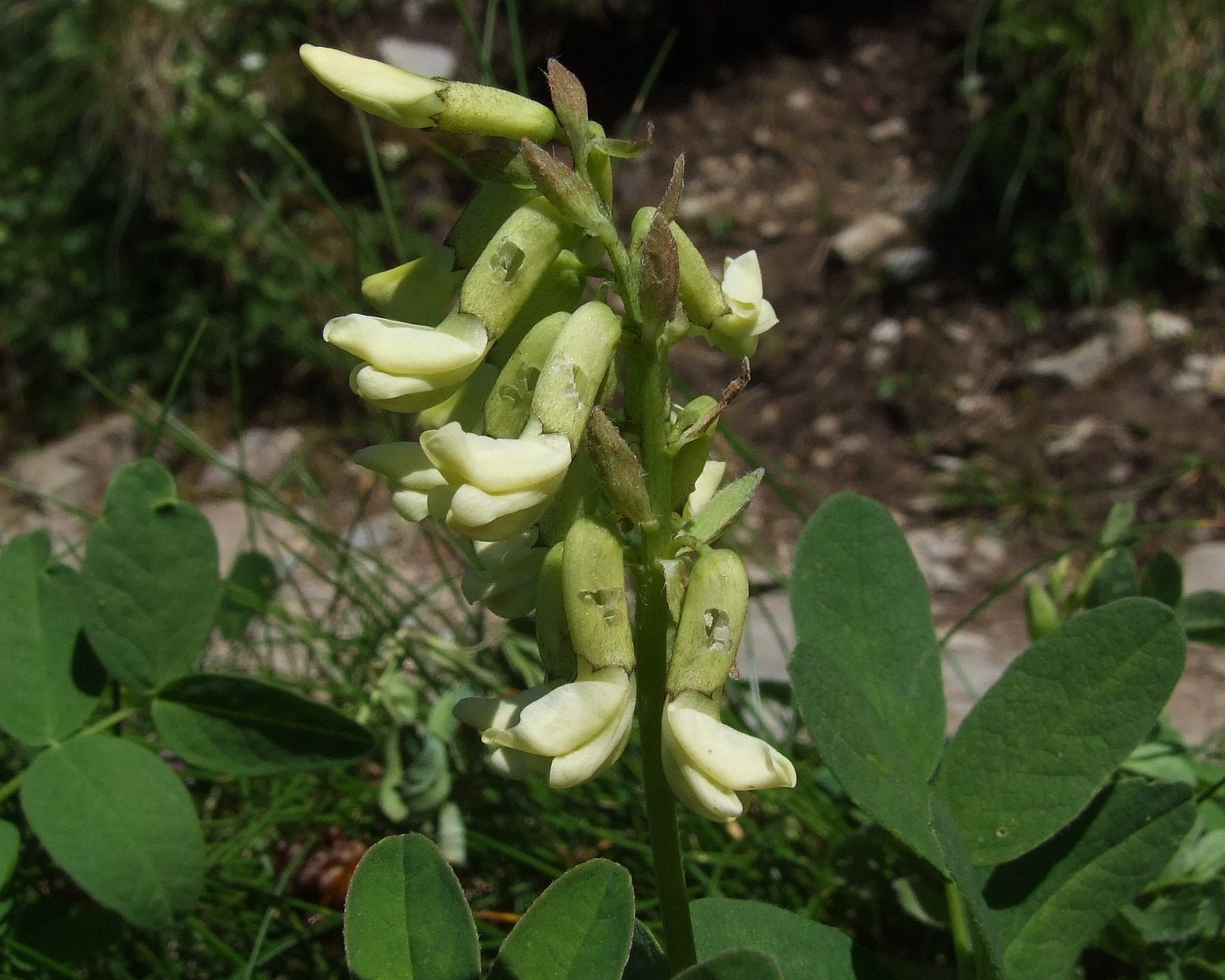 Astragalus frigidus. Tatry Bielskie. Rejon: Szeroka Przełęcz Bielska - Szalony Przechód